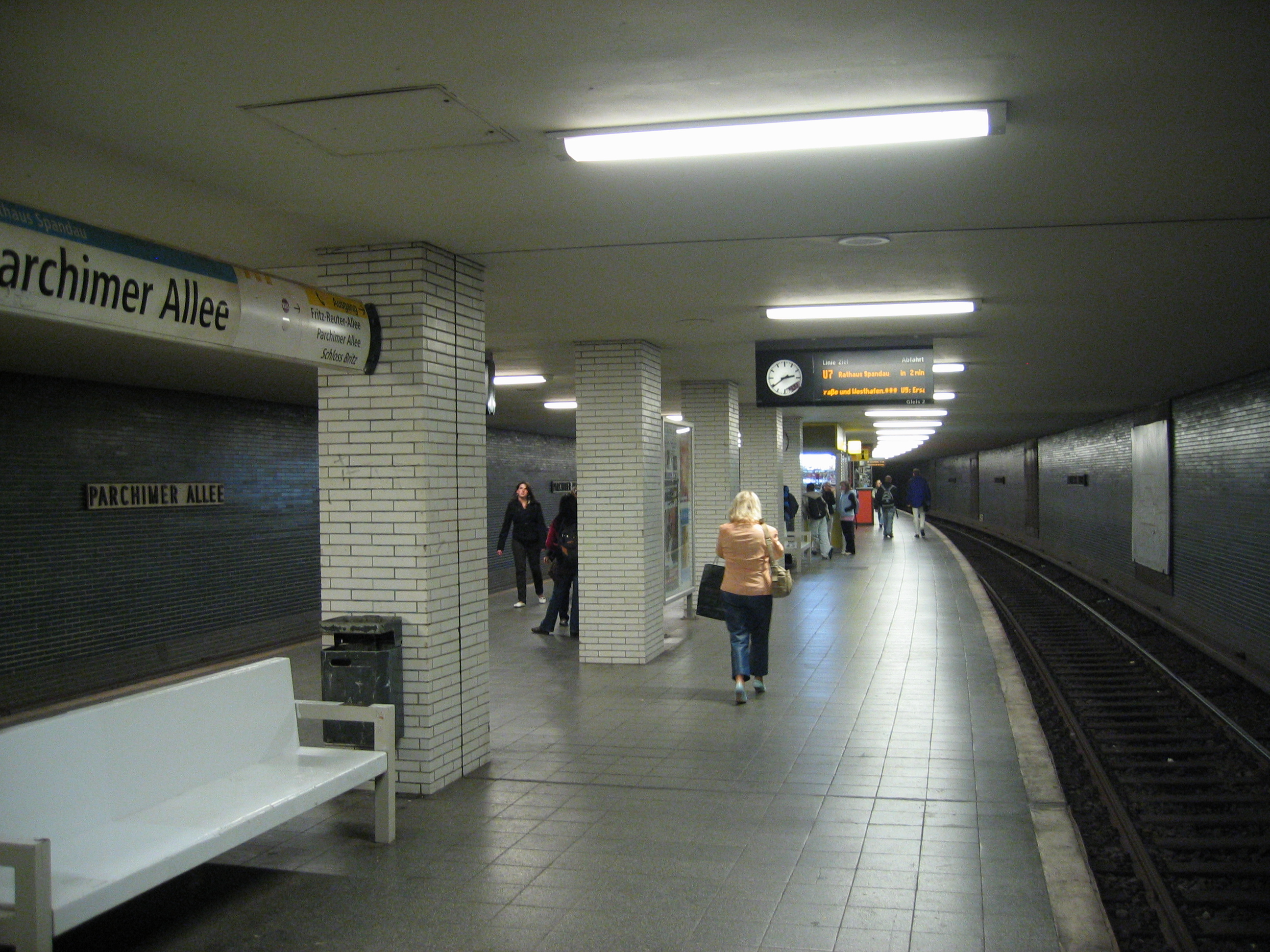 U-Bahnhof Parchimer Allee, Berlin